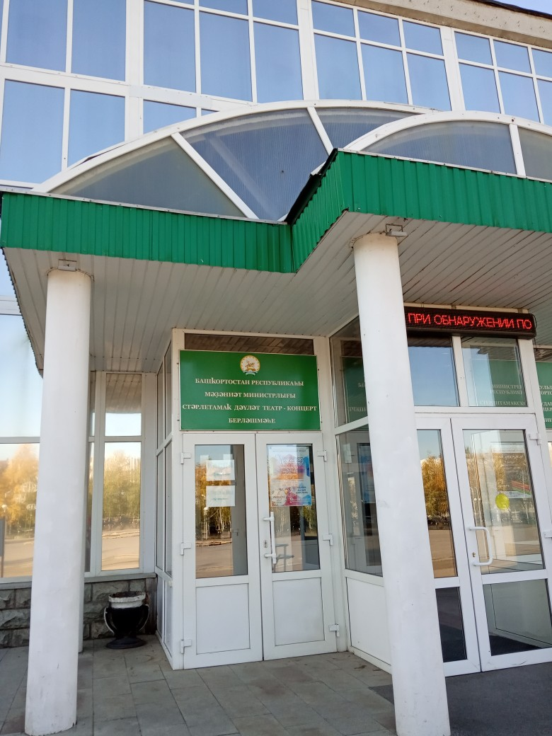 Театрально-концертное объединение г. Стерлитамака РБ